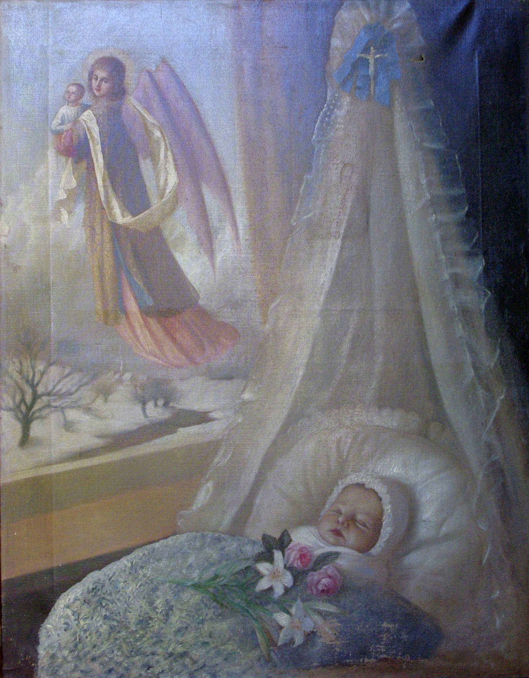 Musée communal de Huy - tableau d'Adolphe Tassin (1852-1923) Léopoldine, fille du peintre mort à 3 jours (1889)